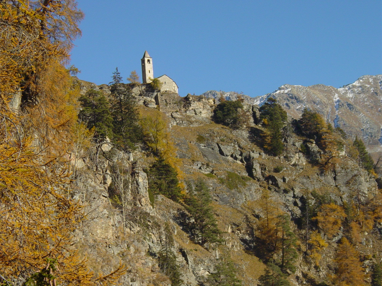 La chiesetta di San Romerio vista dal basso